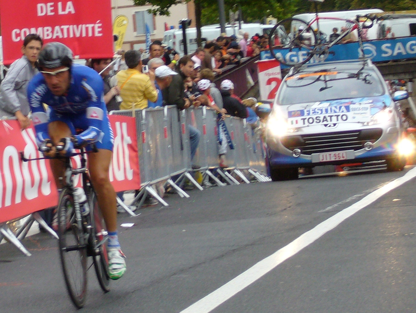 Le courreur cycliste italien Matteo Tosatto lors du contre la montre d'Albi du Tour de France 2007 Matteo Tosatto during the 2007 Tour de France TT in Albi.